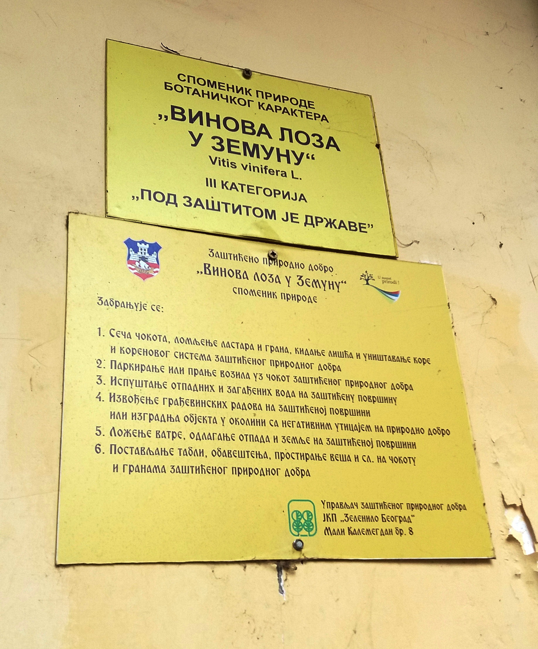 Споменик природе ботаничког карактера "Винова лоза у Земуну"